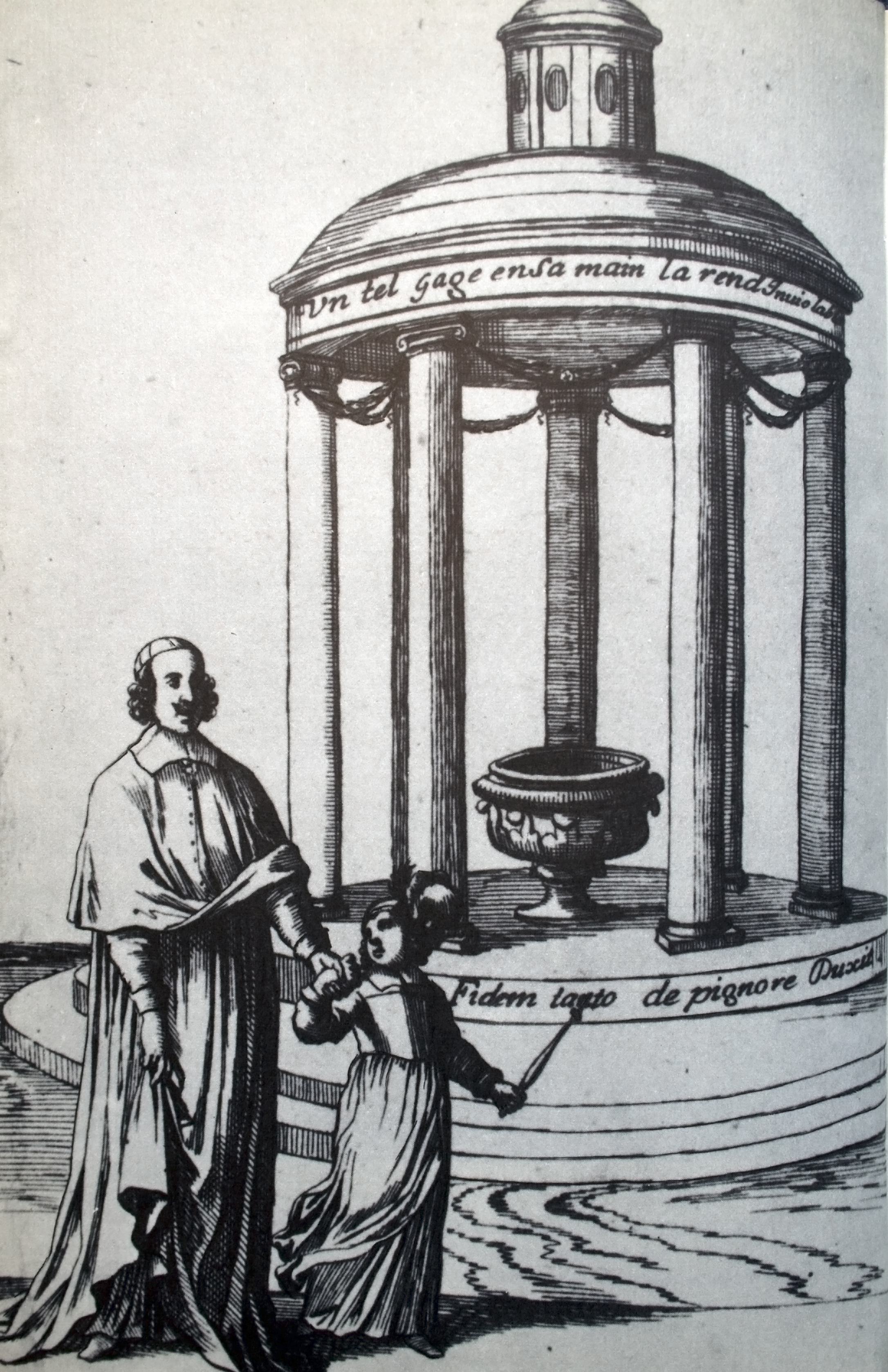 Mazarin, éducateur du Roi